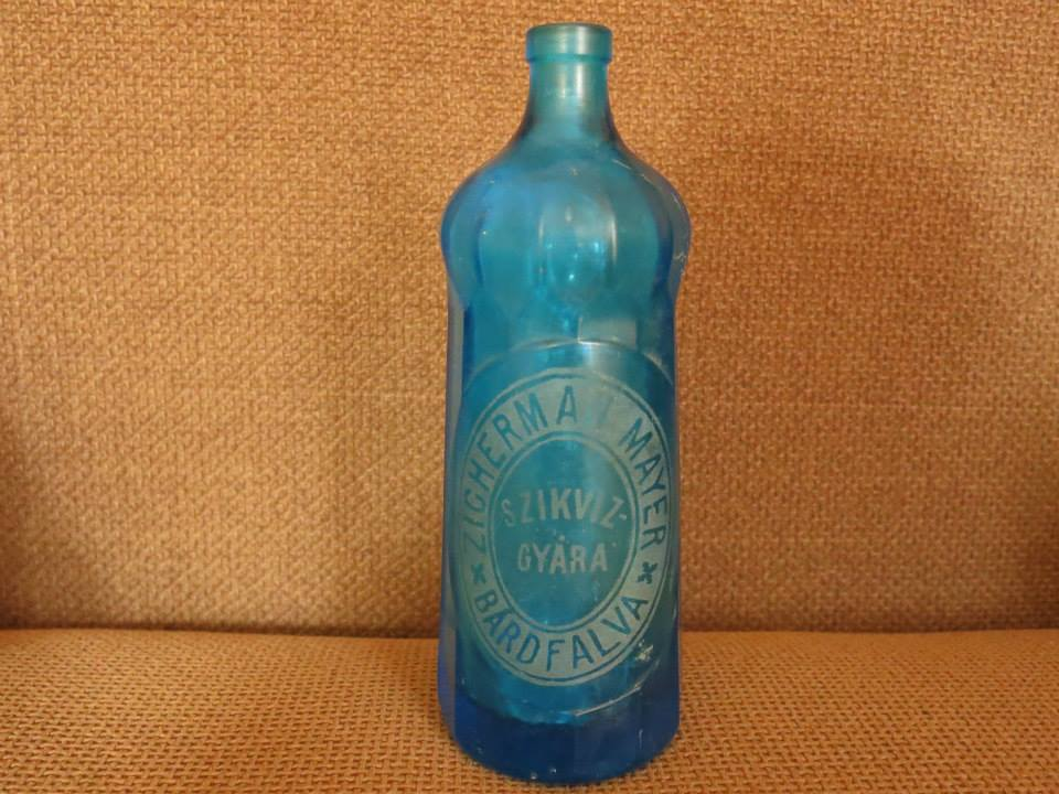 Sticla s-a folosit la îmbutelierea apei minerale sau sifonului. Este de culoare albastră și cântărește 1 kg și este personalizată. Este inscripționată în limba maghiară. Textul se traduce: Fabrica de apă minerală Berbești, Zigherman Mayer.